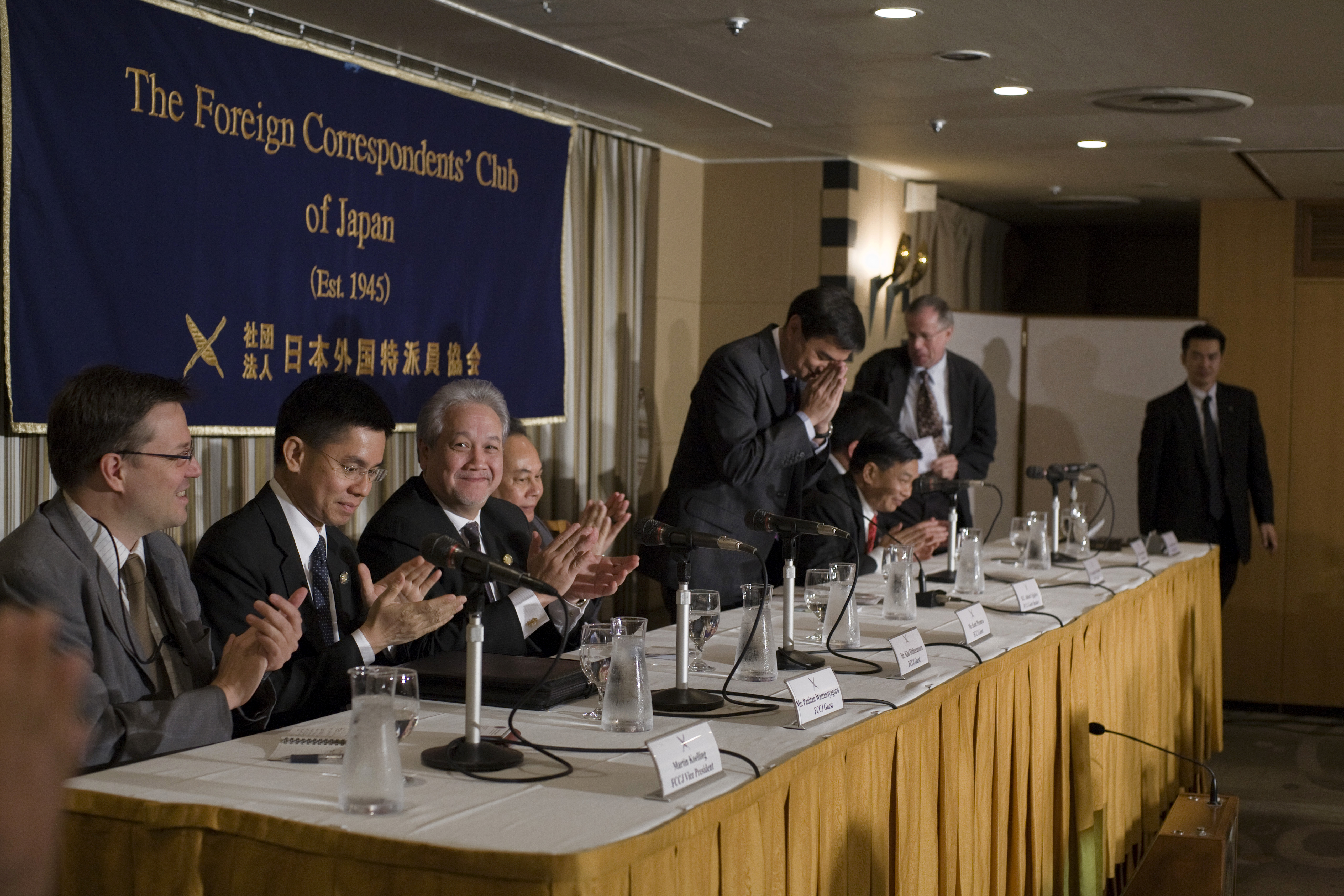 นายกรัฐมนตรีกล่าวสุนทรพจน์ต่อสมาคมผู้สื่อข่าวต่างประเทศ (FCCJ) ณ กรุงโตเกียว ประเทศญี่ปุ่น วันอาทิตย์ ที่ 14 พฤศจิกายน พ.ศ.2553 (Photographer attached to the Prime Minister of the Kingdom of Thailand : Peerapat Wimolrungkarat / พีรพัฒน์ วิมลรังครัตน์) @is50mm